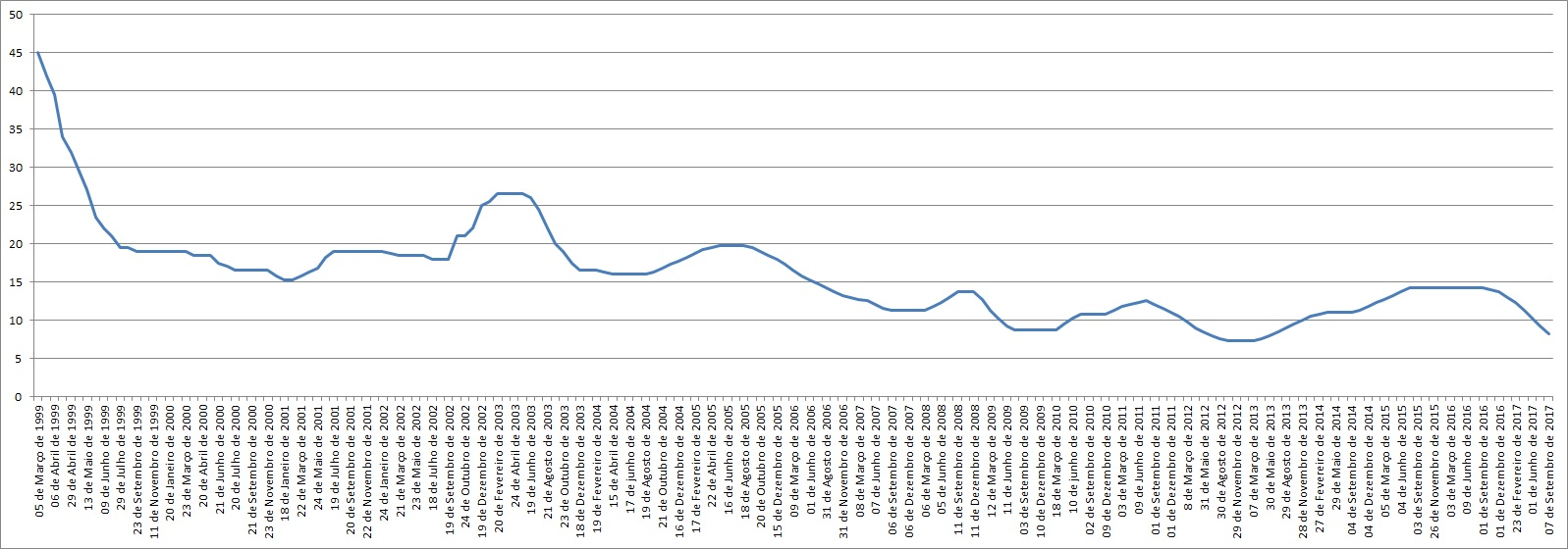 Evolução da taxa SELIC no Brasil, de março de 1999 até o dia atual. Valores em % ao ano.